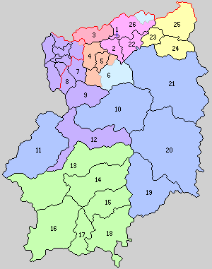 奈良県吉野郡の町村制時点の町村。